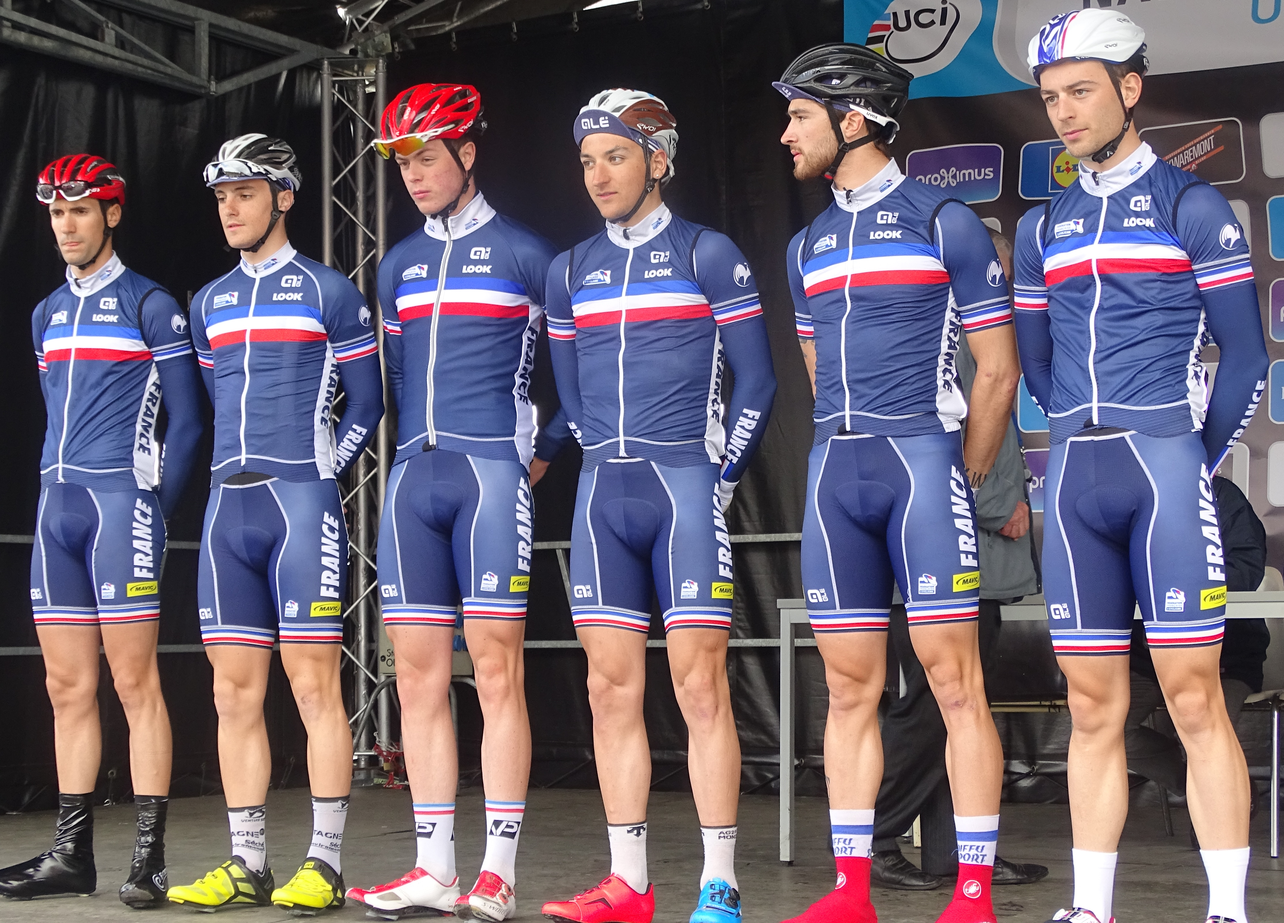 Reportage réalisé le samedi 11 avril à l'occasion du départ et de l'arrivée du Tour des Flandres espoirs 2015 à Audenarde, Belgique.